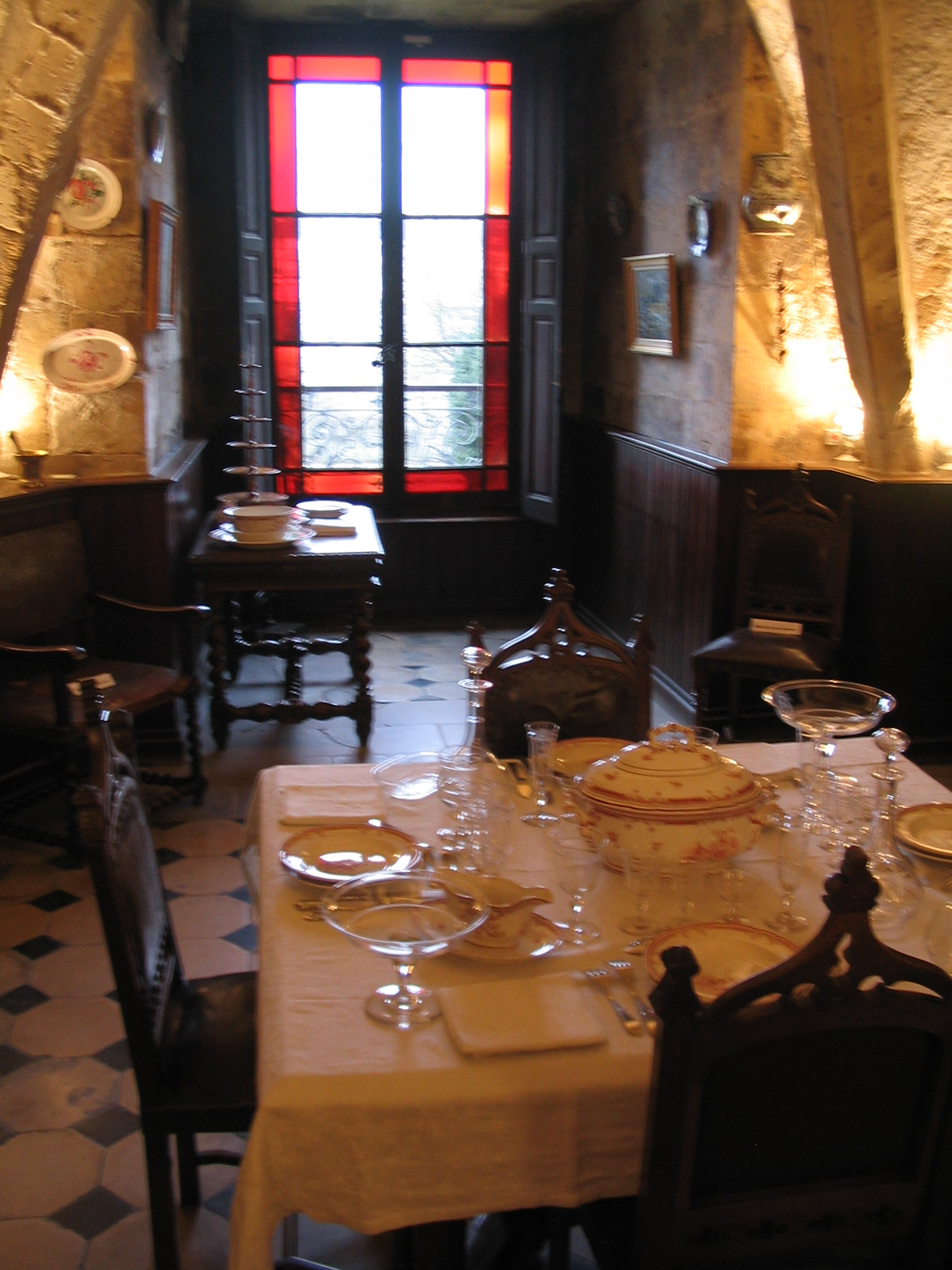 Musée Gallé-Juillet de Creil, la cuisine, France